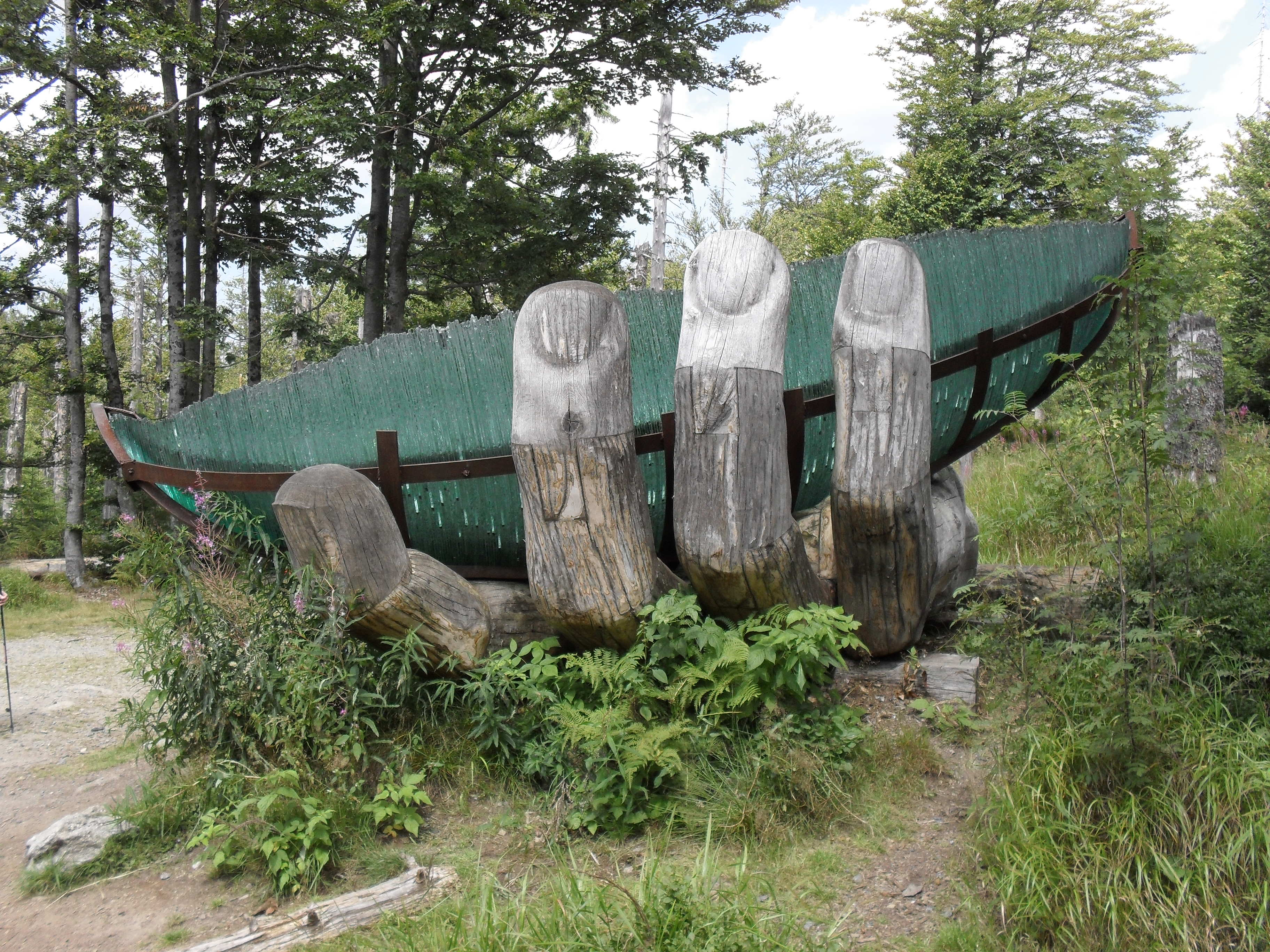 Fotografie pořízená na Luzném.